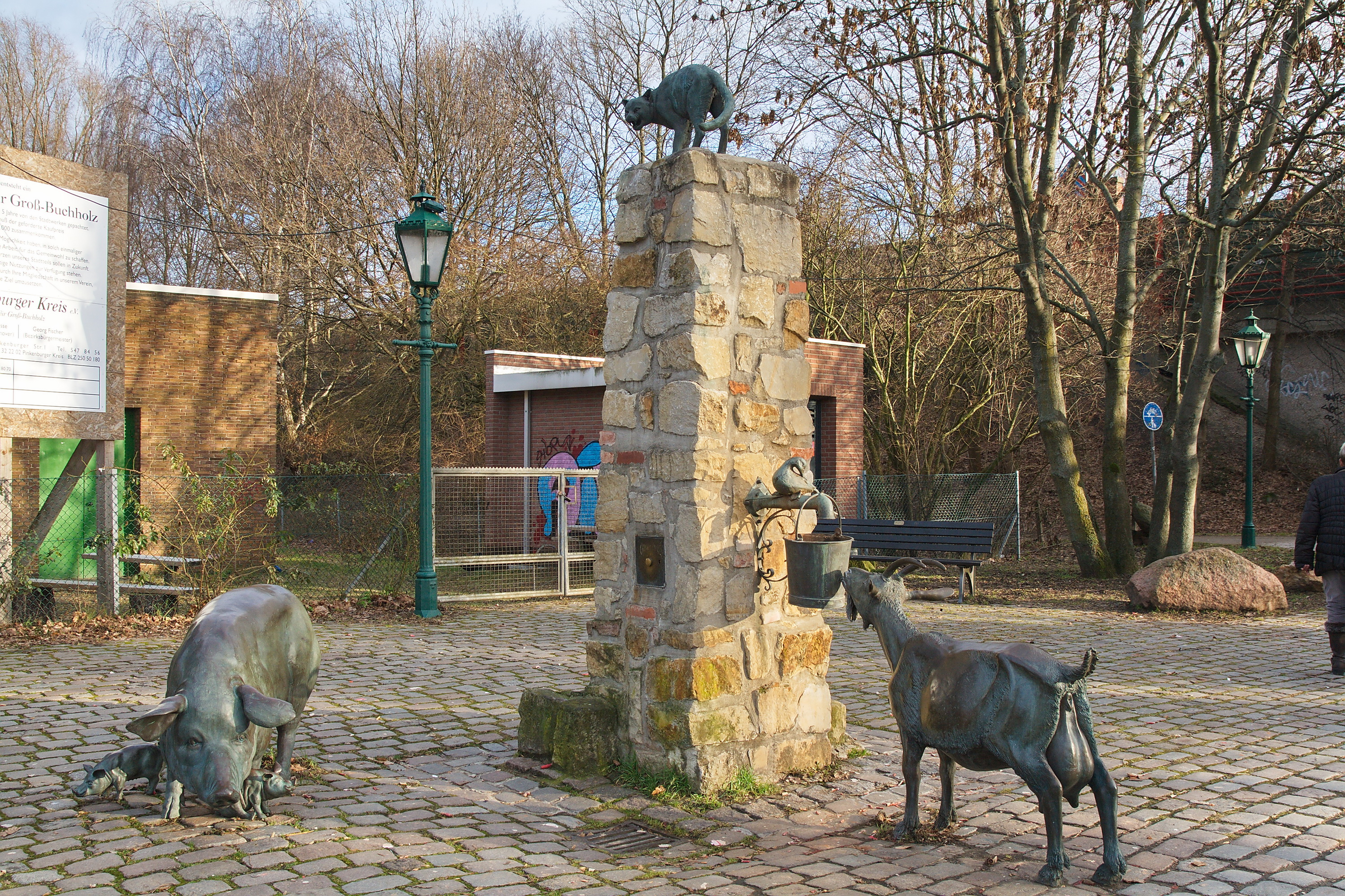 Dorfbrunnen in der Pinkenburger Straße in Großbuchholz (Hannover), Niedersachsen, Deutschland.